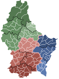 Verwaltungsgliederung Luxemburgs: Bezirke, Kantone und Gemeinden Luxemburgs